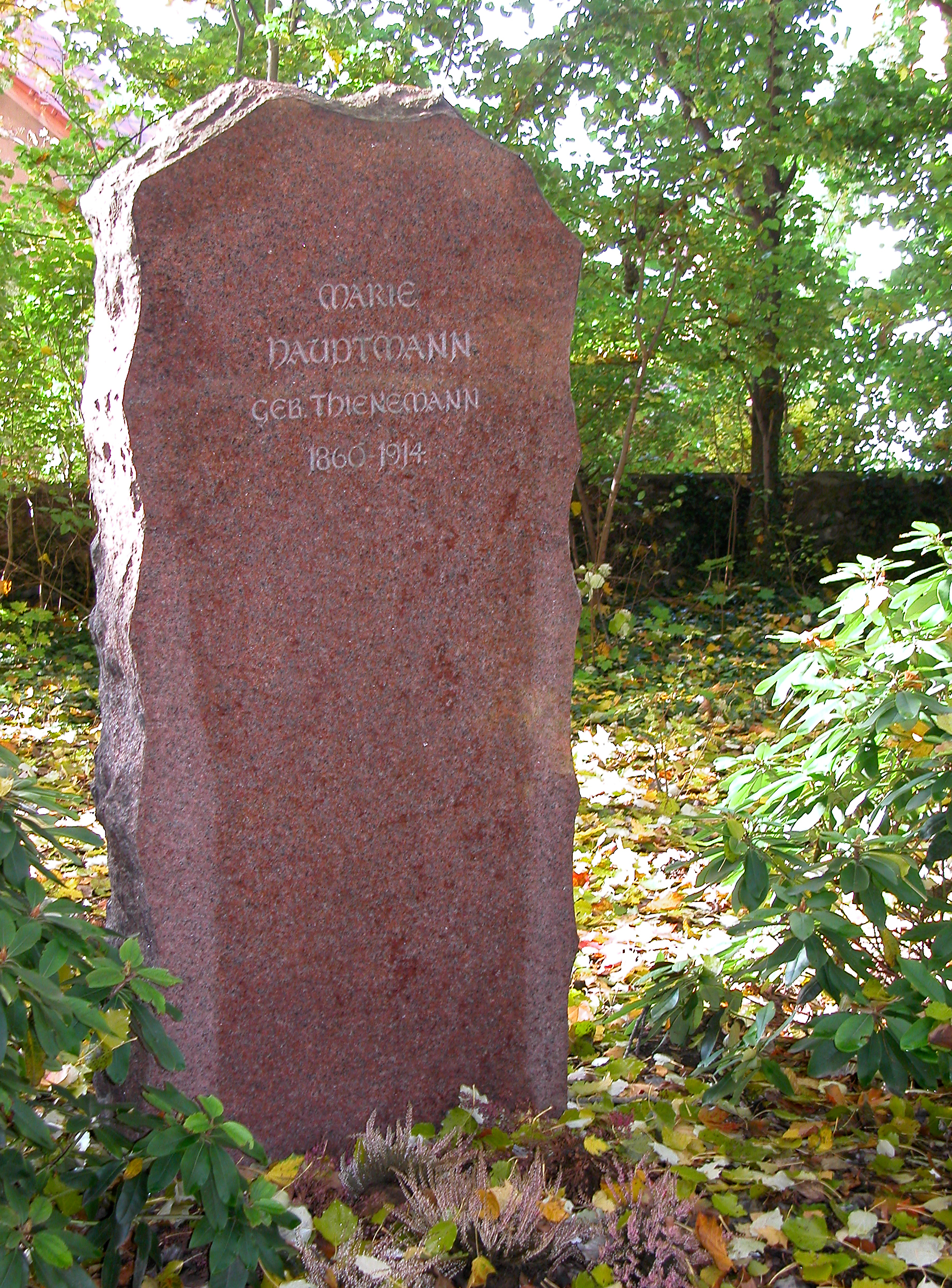 30.10.2009 01445 Radebeul-Zitzschewig: Hohenhaus, Haus Bischofsberg, Barkengasse 6 / Ecke Hohenhausweg (GMP 51.121045,13.610670). Grabstein der Marie Hauptmann, geb. Thienemann, 1860-1914- Nach Auflösung der Grabstelle in Hamburg wurde der Stein am 22.09.2007 in den Park Hohenhaus versetzt (GMP 51.120042,13.610134). [DSCN39674.TIF]20091030065DR.JPG(c)Blobelt